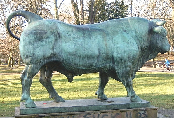 Source:Made by myself --Peng 15:24, 11 Jun 2005 (UTC) Date:4.2.05 Bild: Bulle aus Bronze und Weißblech, Standbild im Günthersburgpark in Bornheim bei Frankfurt. Günthersburgpark LIZENZ